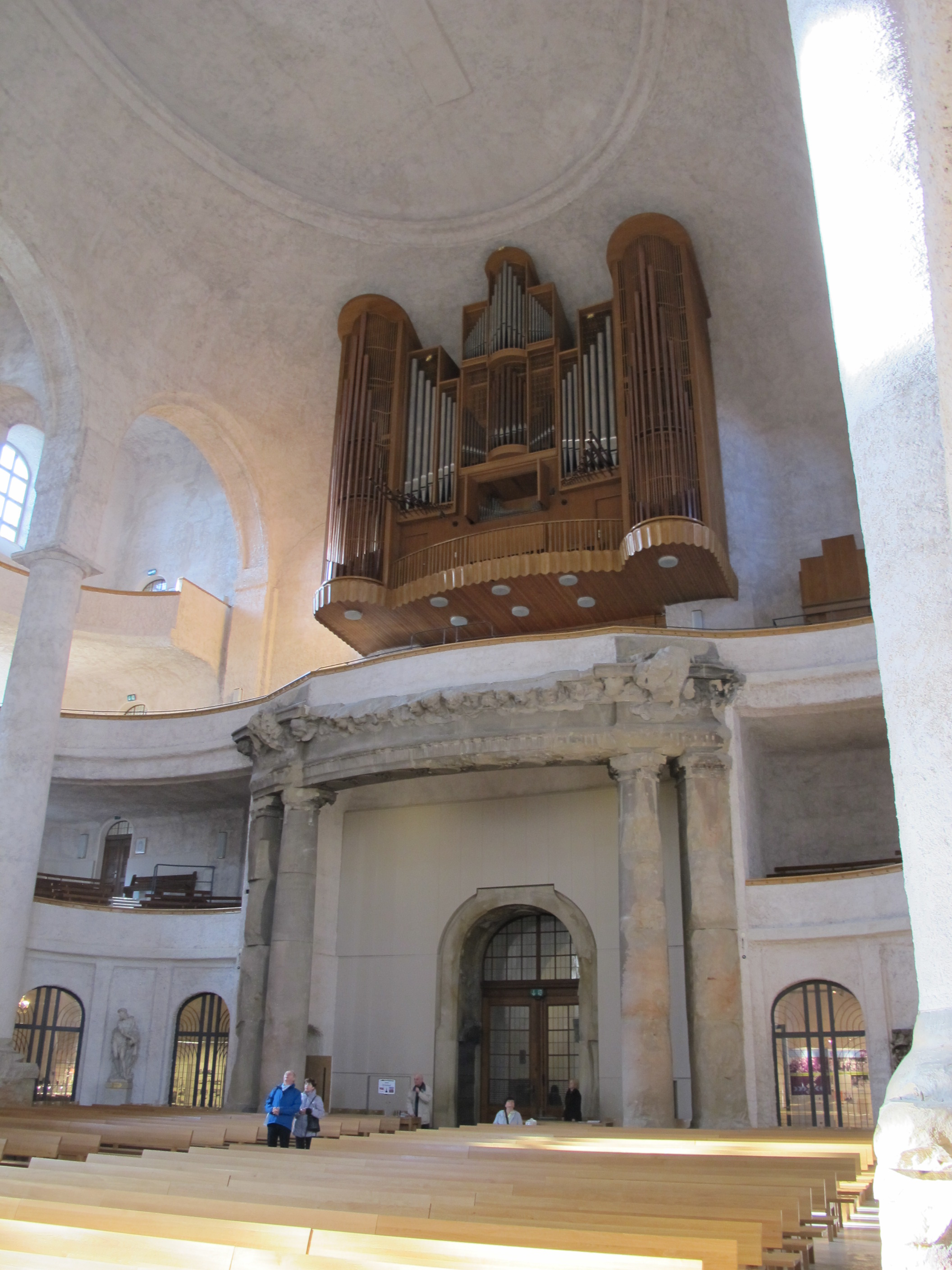 Kreuzkirche, Dresda, interno